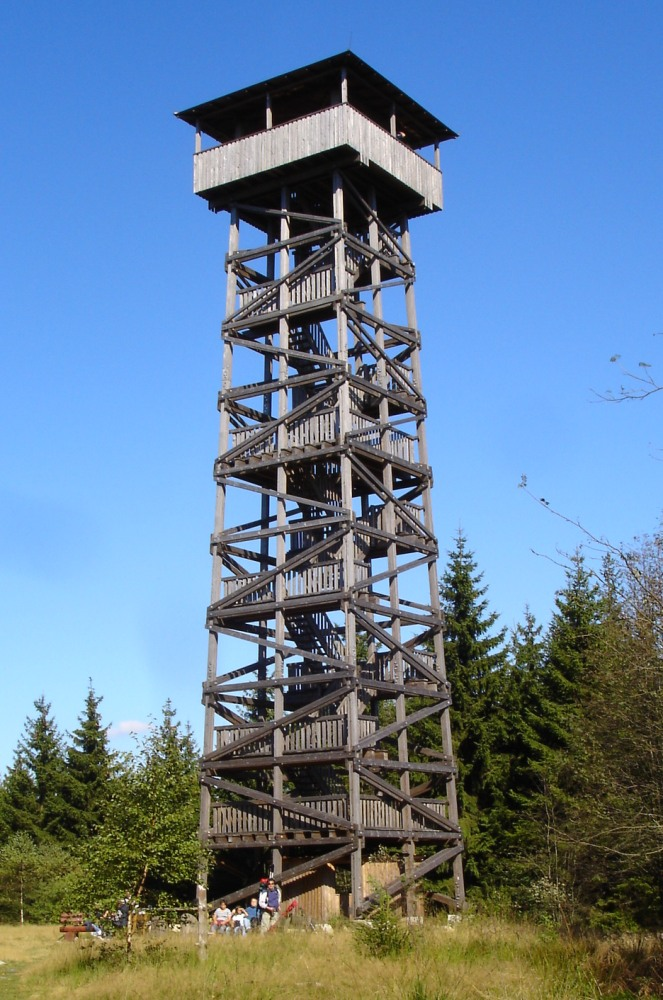 Der Kelerwaldturm auf dem Wüstegarten, der höchsten Erhebung des Kellerwaldes und des Schwalm-Eder-Kreises